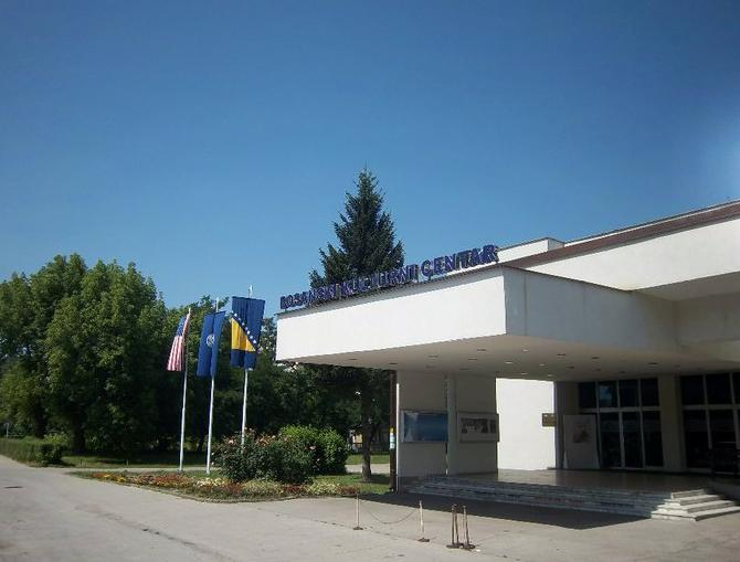 Зграда Америчког универзитета у Босни и Херцеговини у Тузли